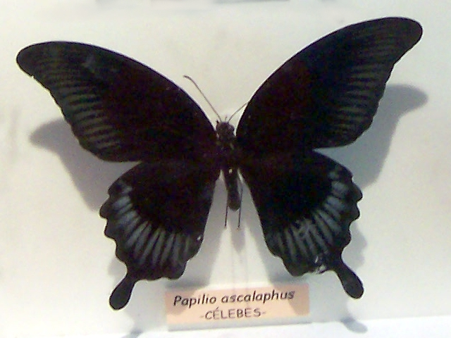 Papilio ascalaphus, Boisduval 1836